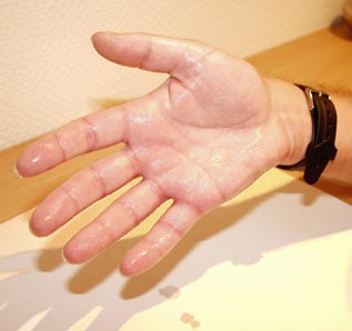 Hand von Sascha Ballweg , Gründer der Selbsthilfeseite